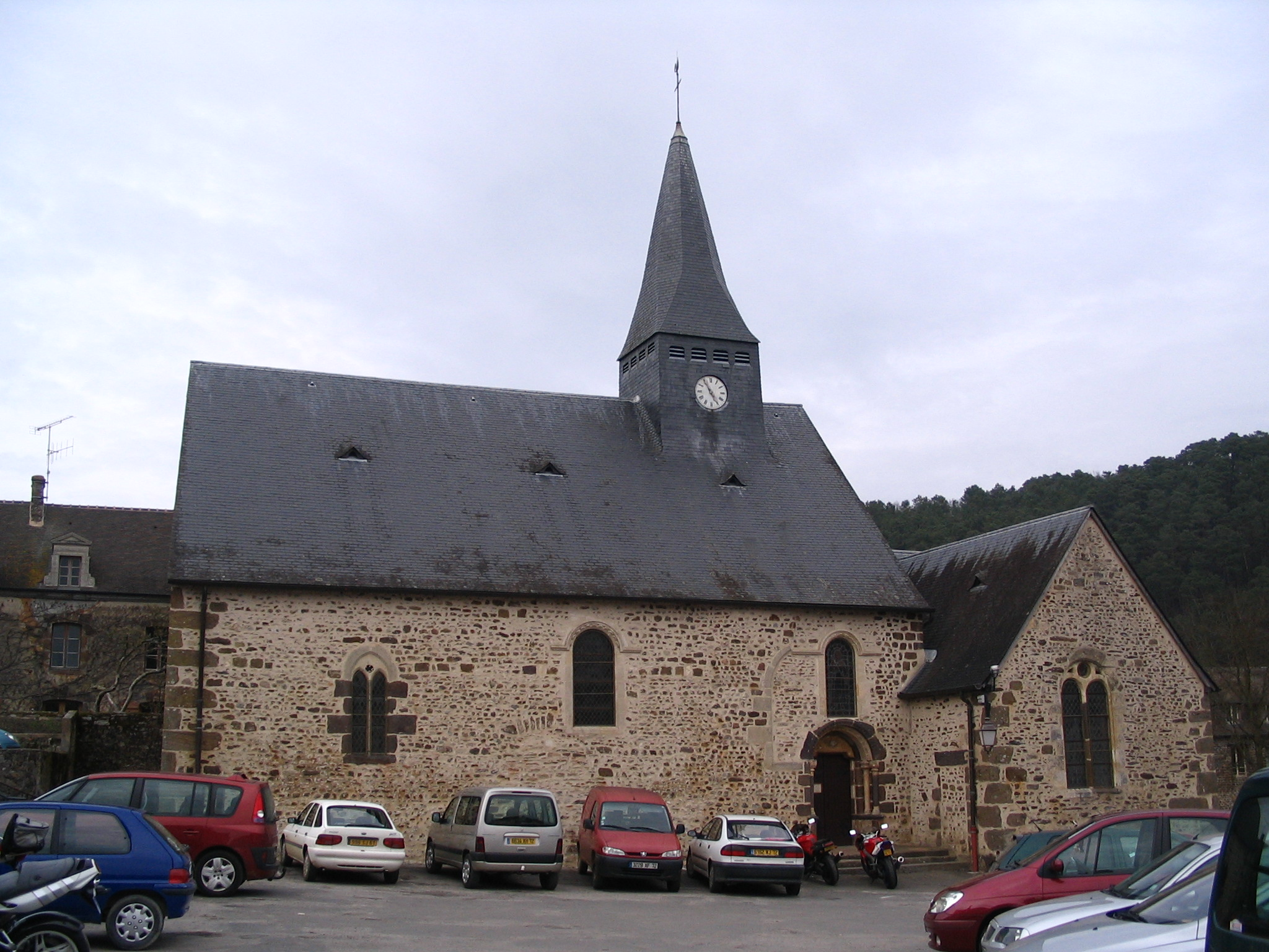 Eglise de la commune de Saint-Léonard-des-Bois (Orne, France)